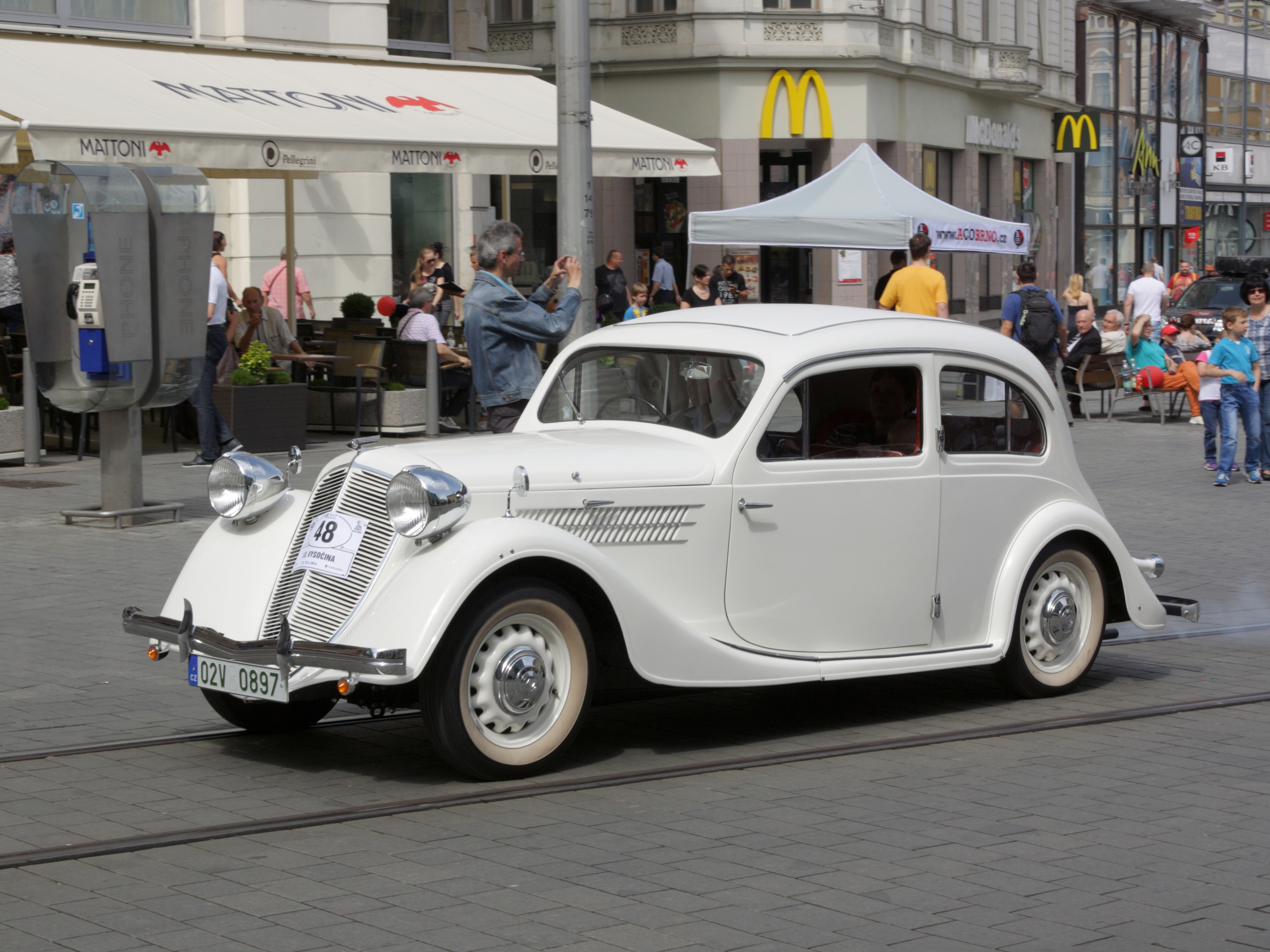 Brno, náměstí Svobody - start XXI. Srazu historických vozidel Vysočina 2014. Z 5 Expres.